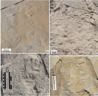 En el marco de mapear el área del Bloque San Rafael, se tomaron fotos de fósiles.